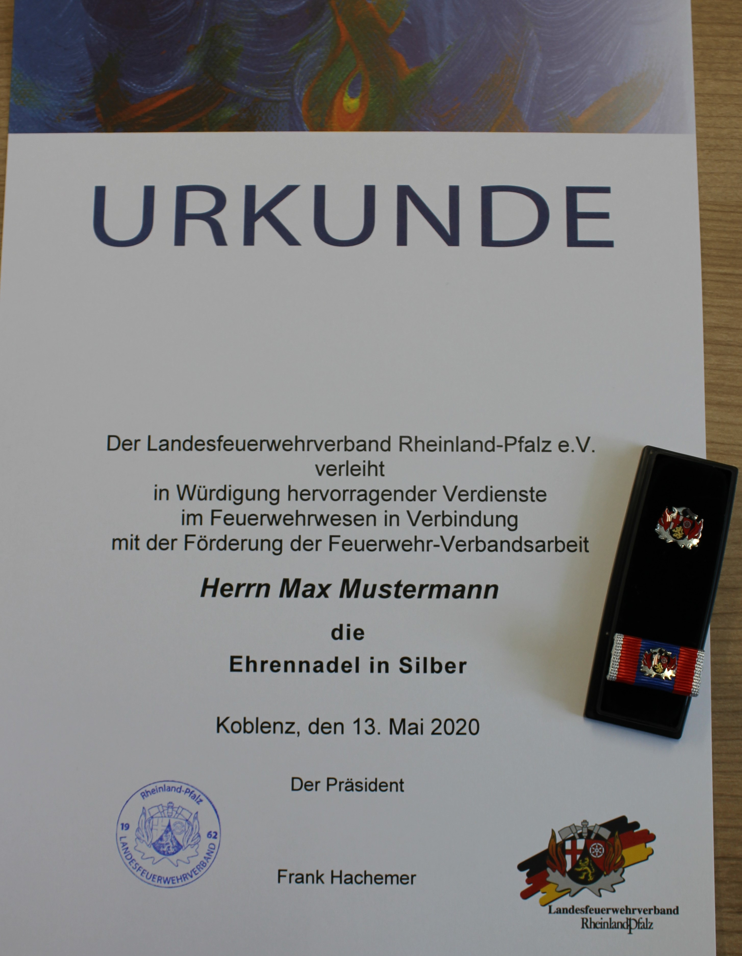 Urkunde mit Ehrenadel und Bandschnalle